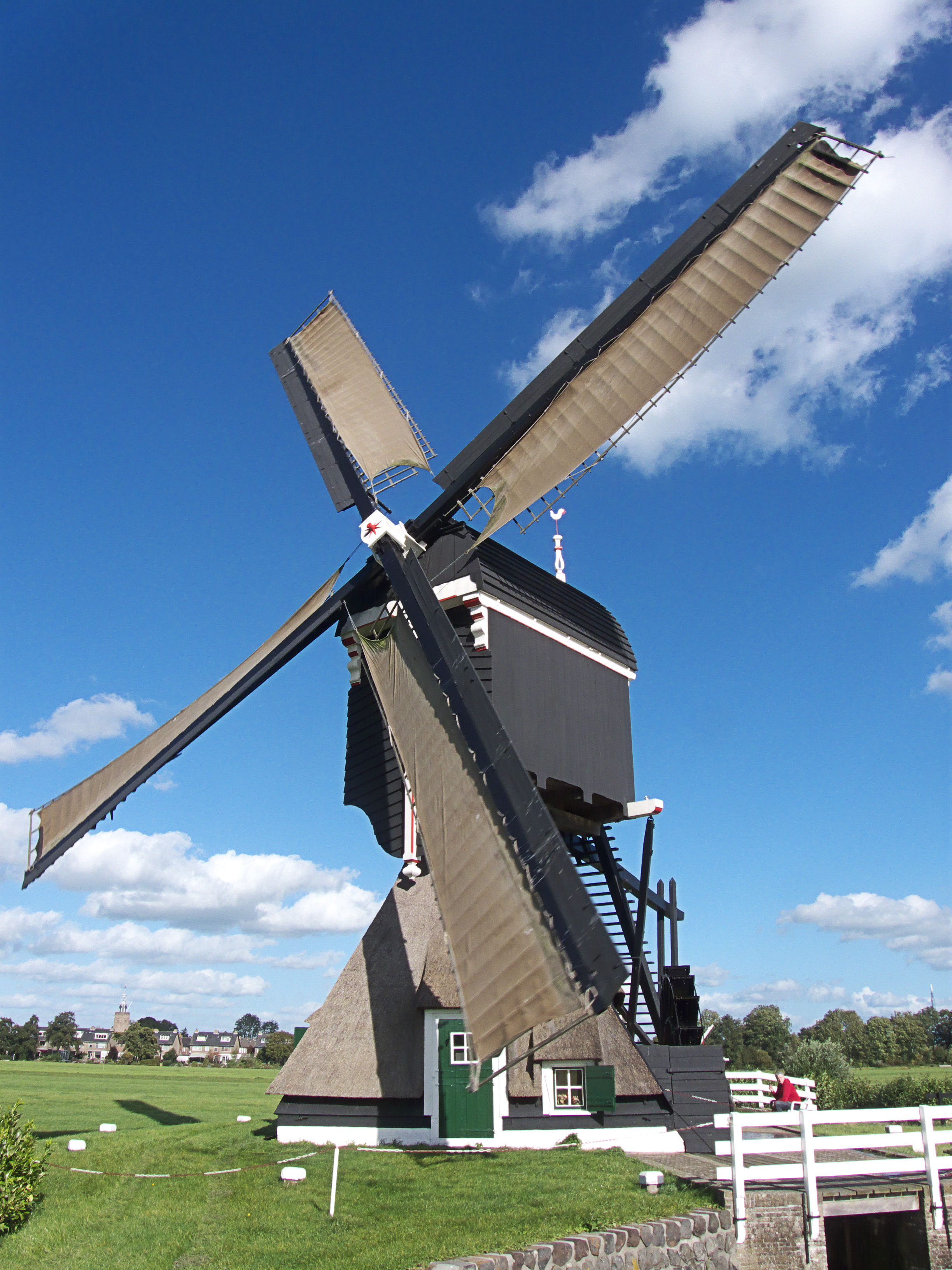 Molen Kleine Tiendwegmolen, Streefkerk